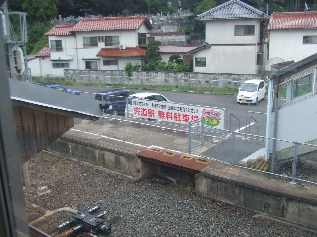 宍道駅 旧4・5番のりば